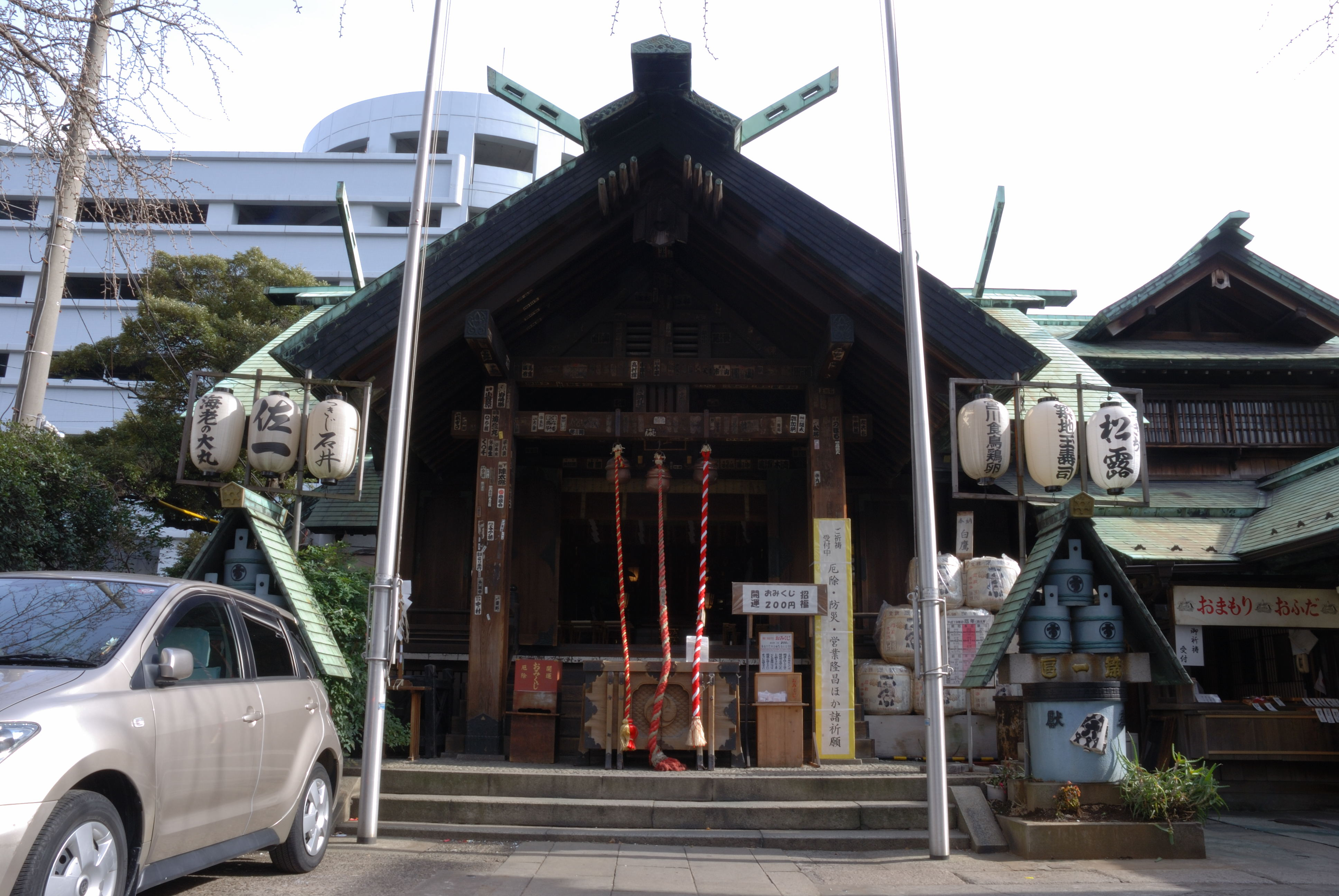 Namiyokeinari jinja